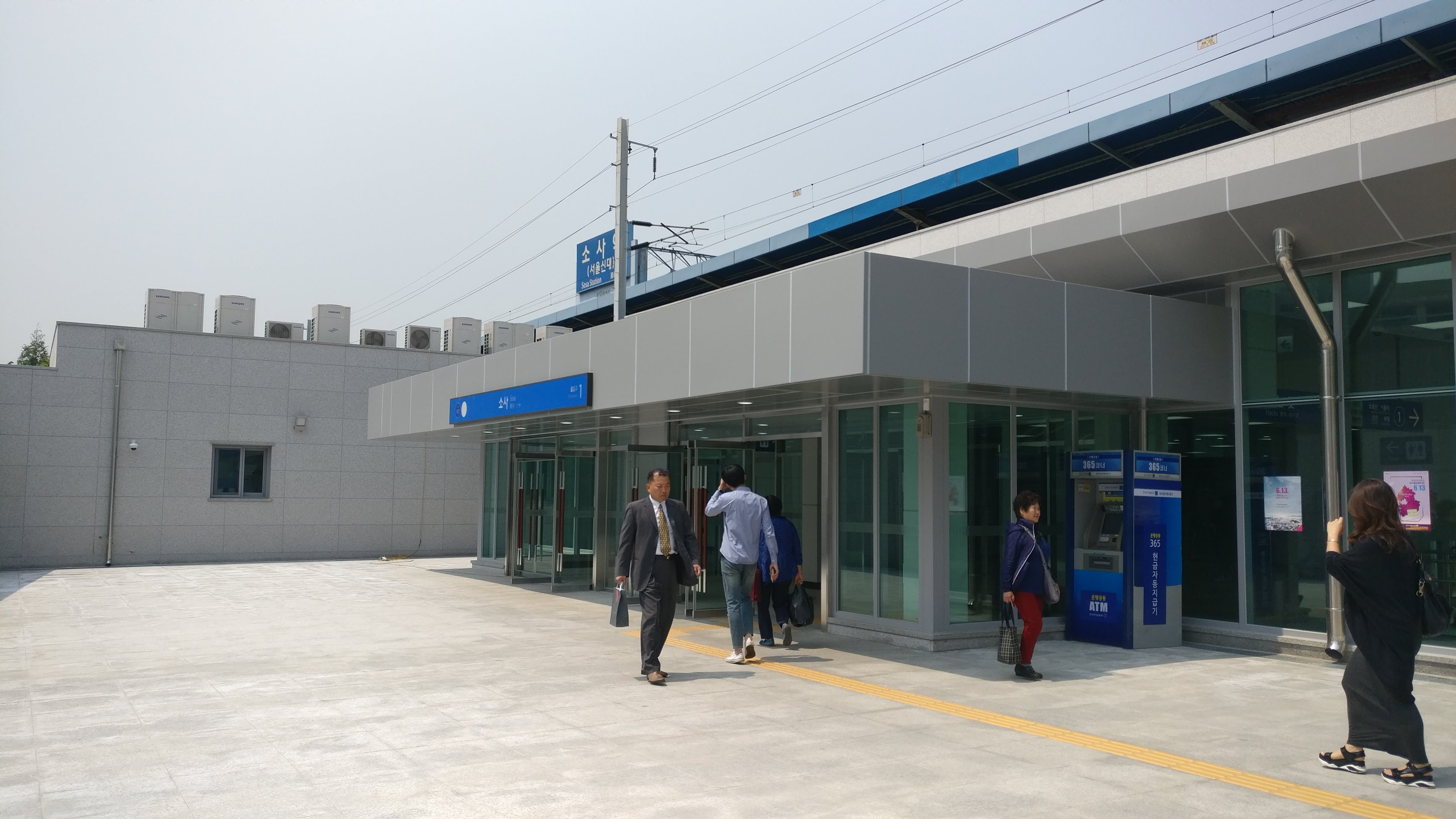 서해선 개통 몇 개월을 앞두고 새로워진 소사역 1번 출입구의 모습